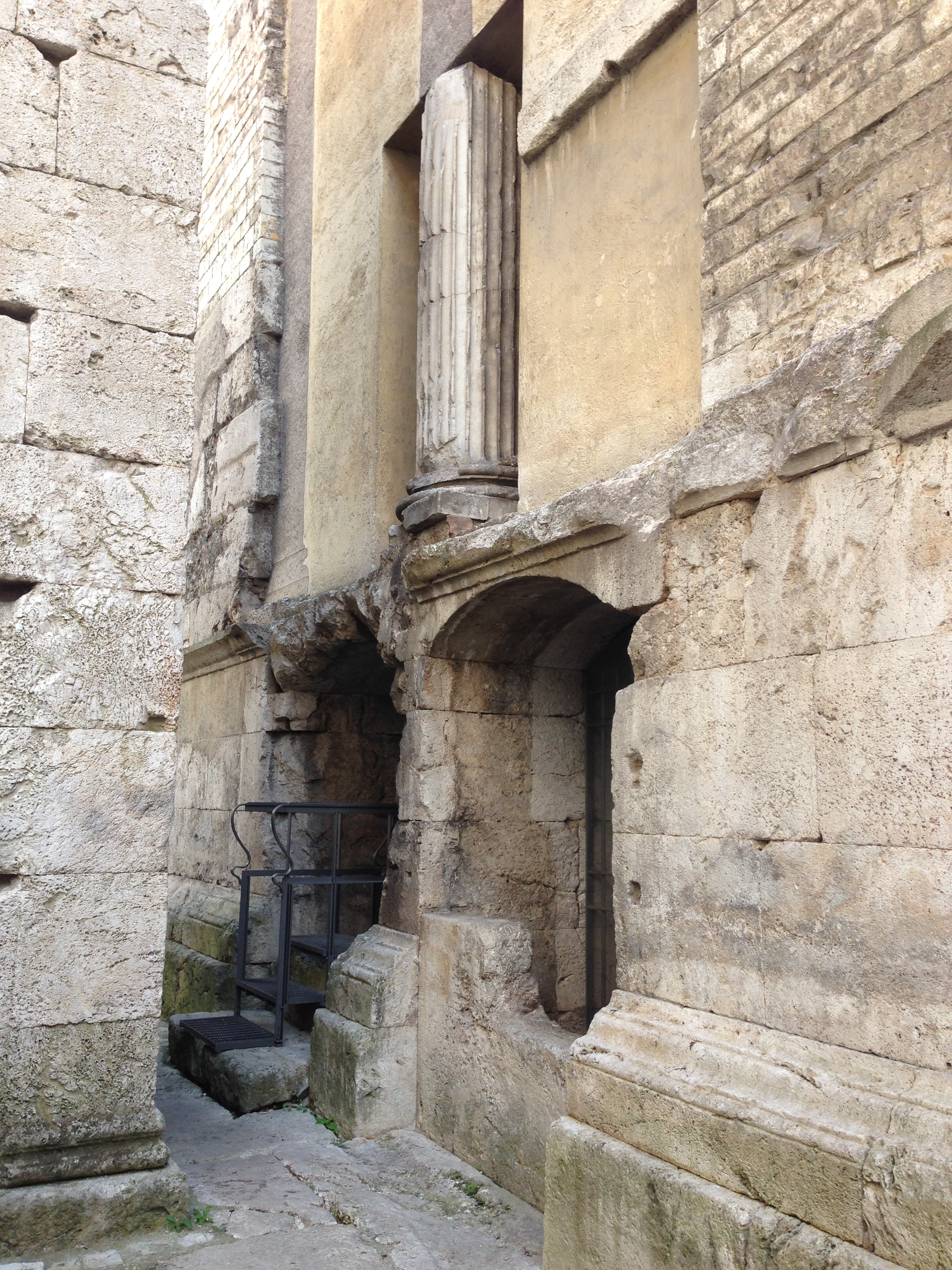 Resti del Tempio romano Sant'Ansano di Spoleto